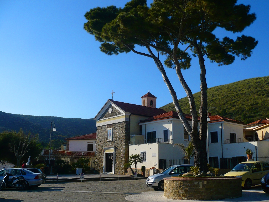 La chiesa santa maria delle grazie a ogliastro marina di castellabate in piazza giovanni paolo II